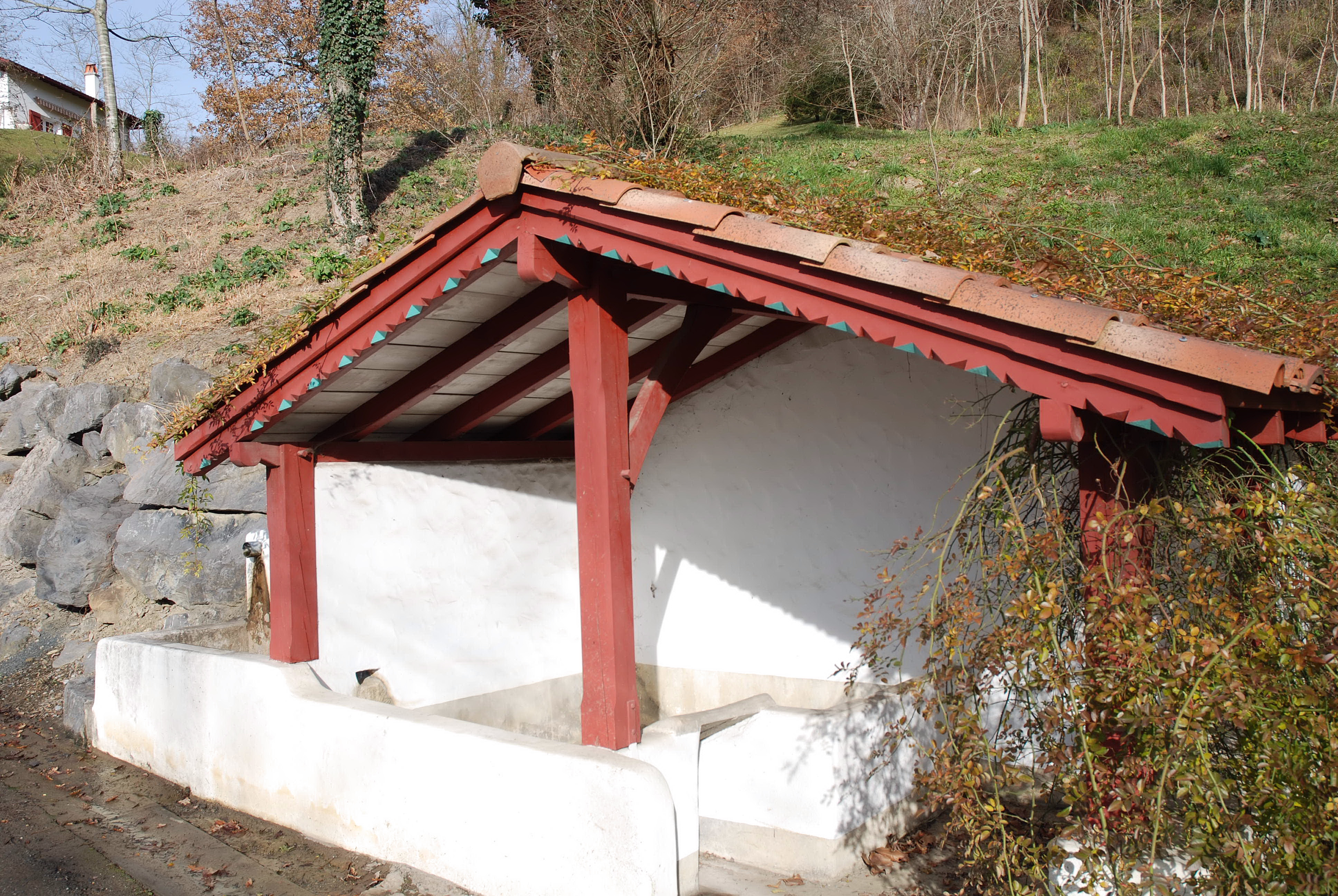 Un vieux lavoir à Cambo-les-Bains, photo prise le 31/12/06 par Harrieta171